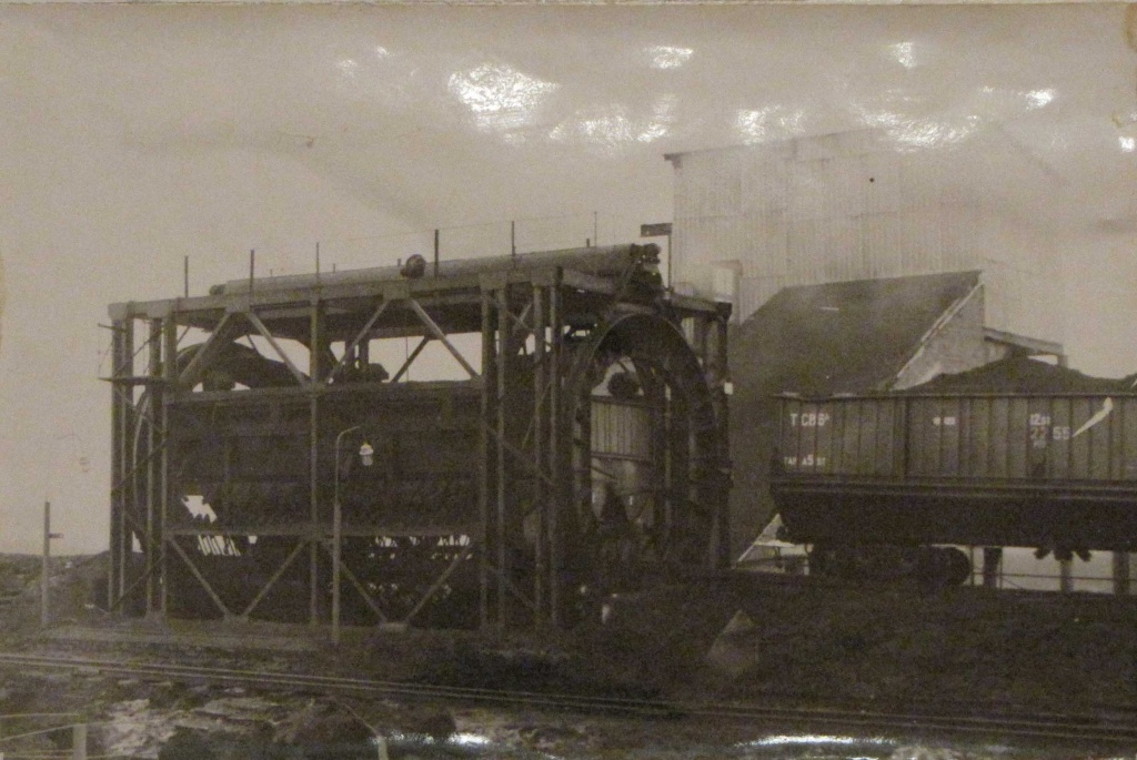 Торфоперегружатель